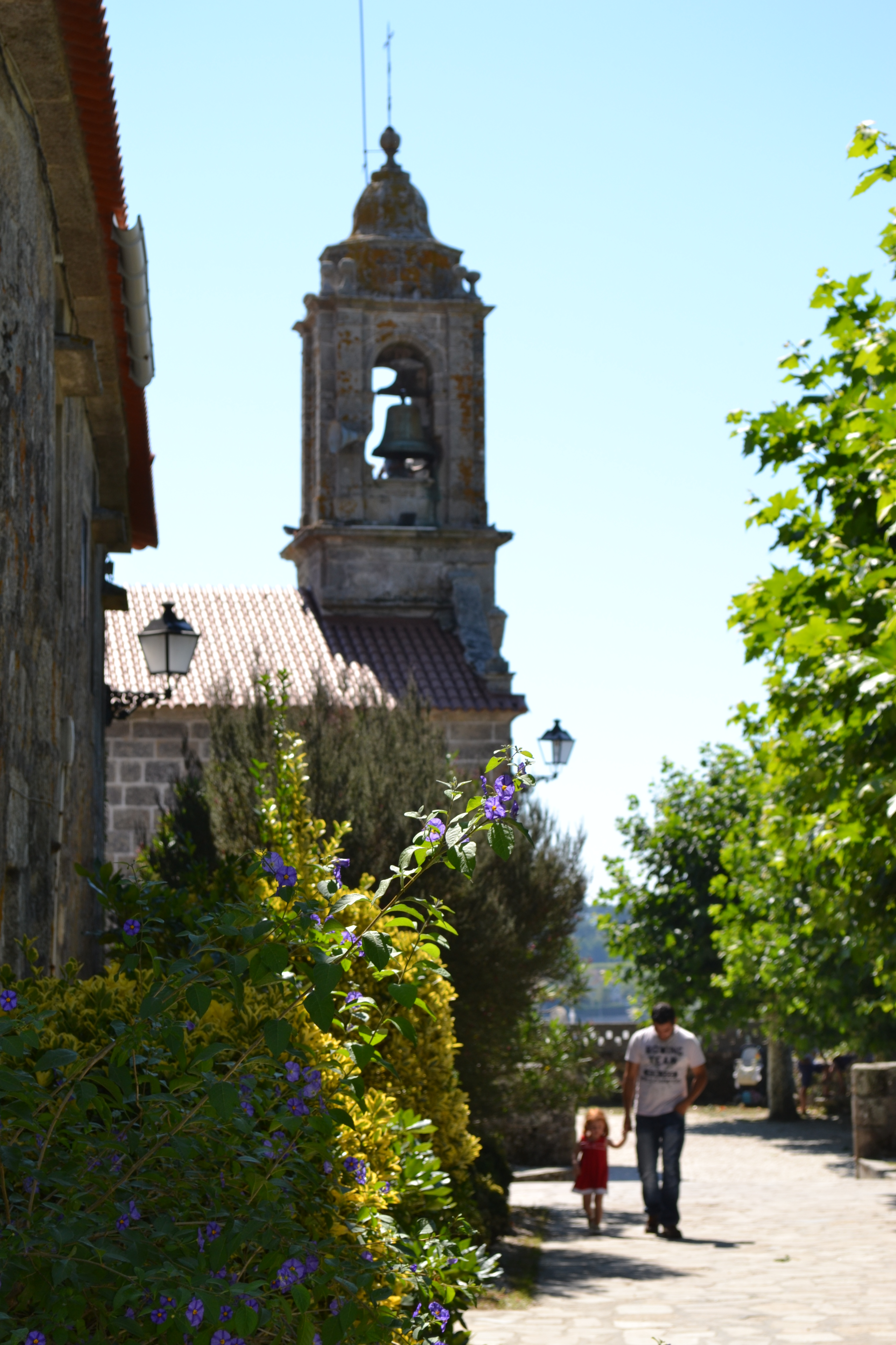 Iglesia parroquial de la Santa Cruz de Castrelo (Cambados).